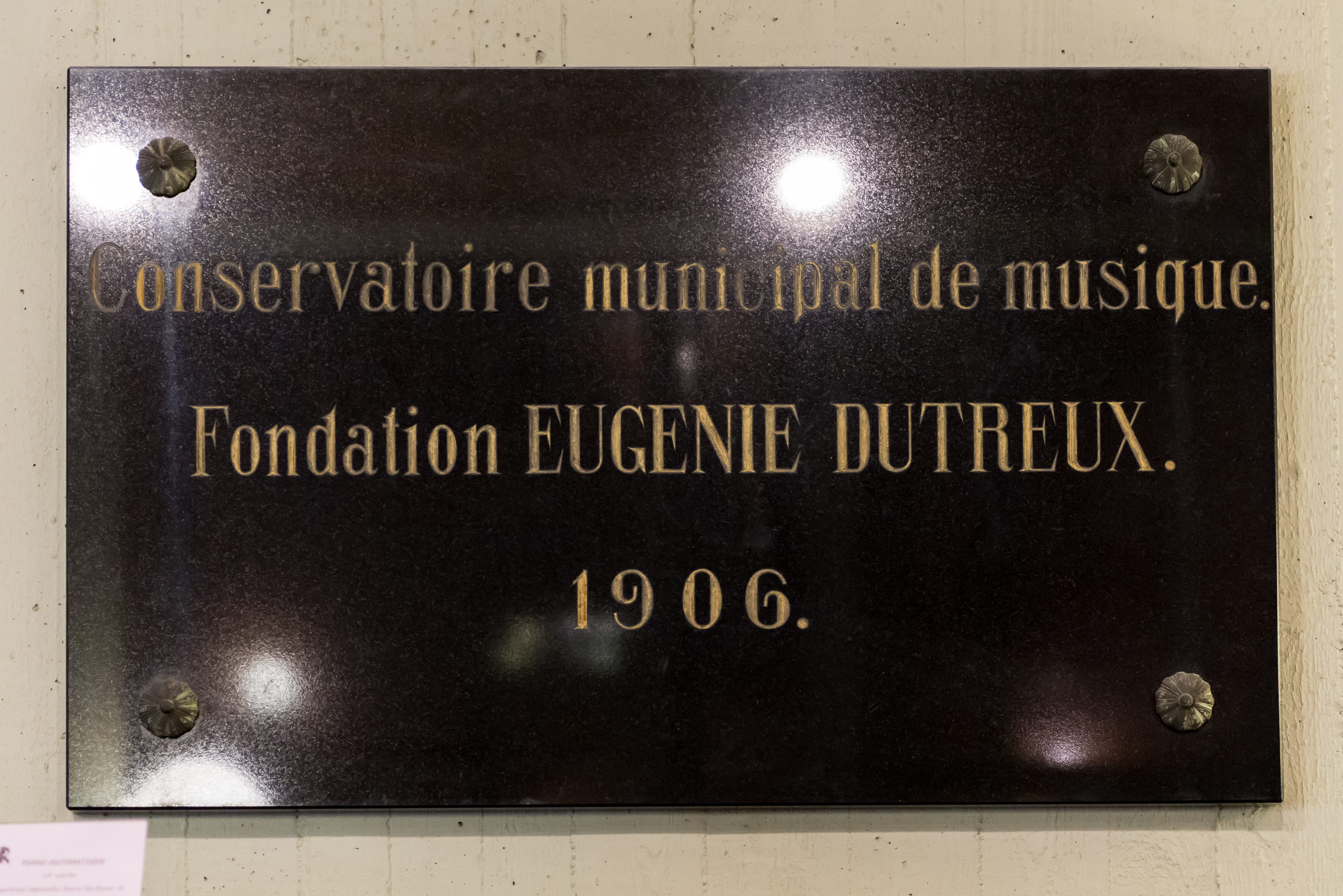 Plack Fondatioun Eugénie Dutreux am Stater Conservatoire.